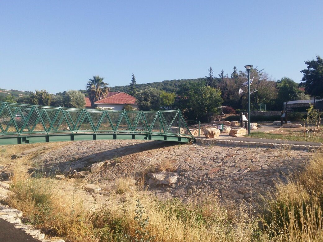 הגשר בטיילת במושב חוסן נכון לשנת 2017 ביוני.